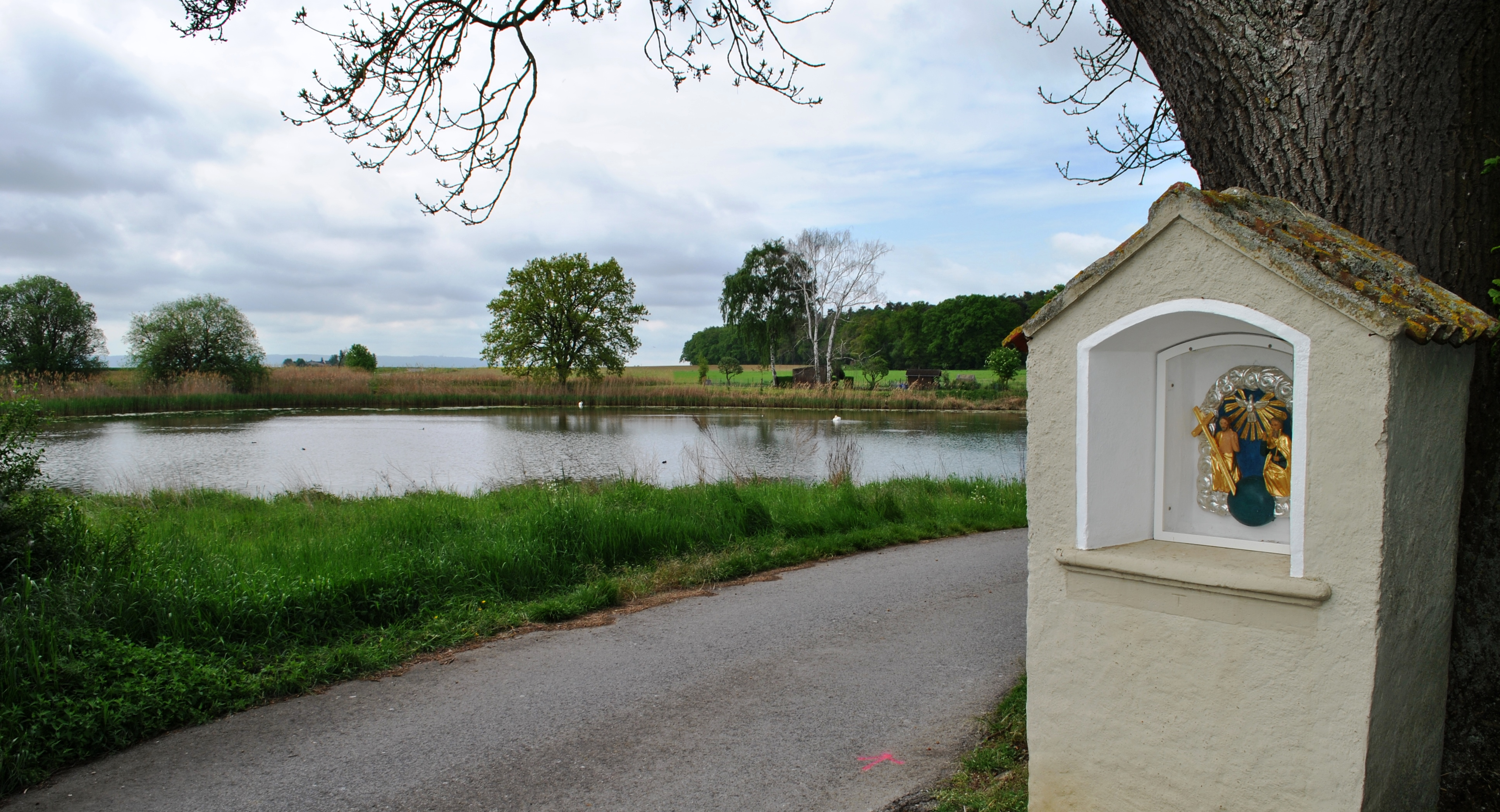 Dorfweiher Rimbach, südlicher Dorfausgang, Bildhäuschen Mit Holzrelief der Dreifaltigkeit, 18./19. Jahrhundert